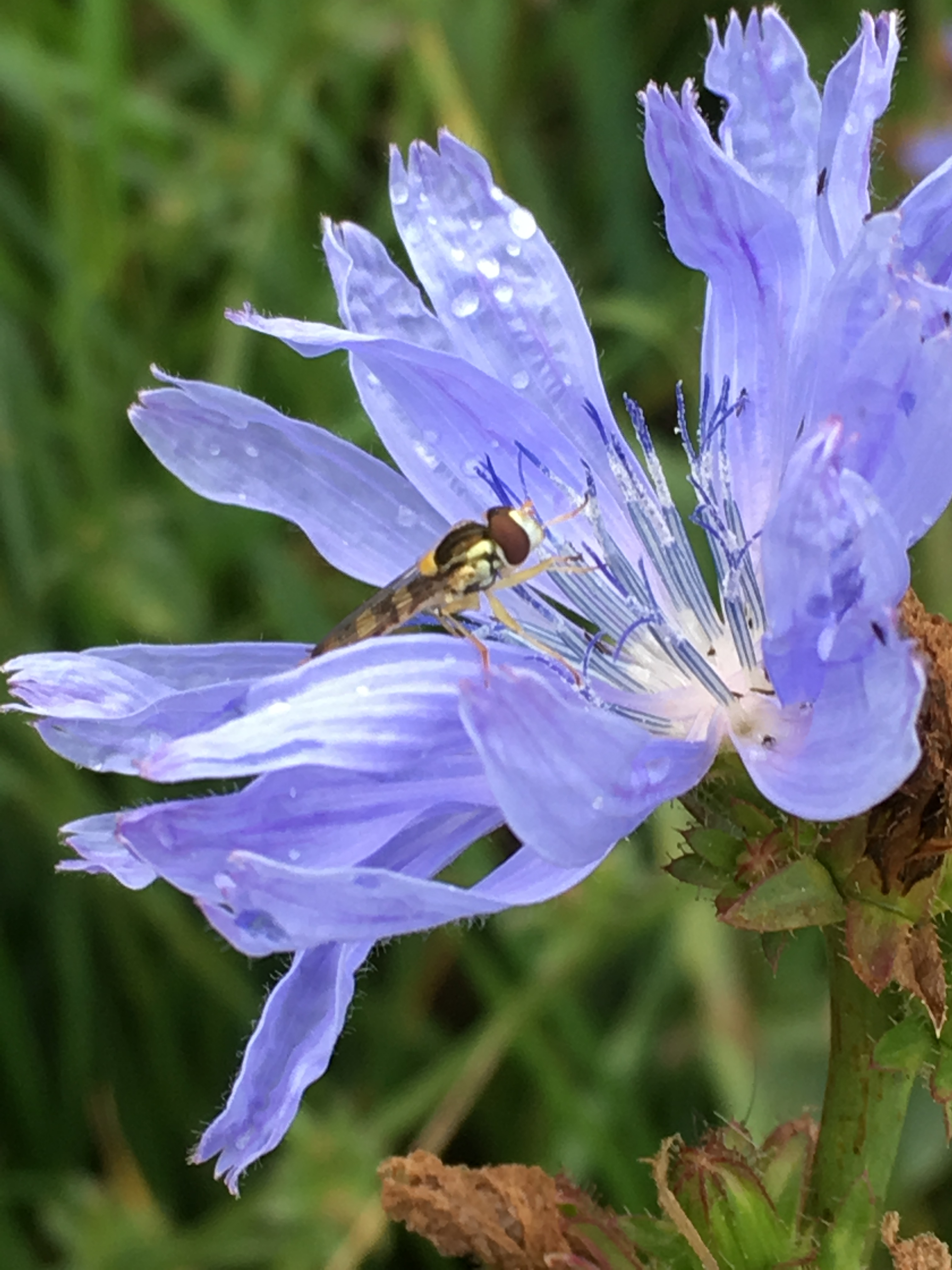 Cykoria podróżnik po deszczu